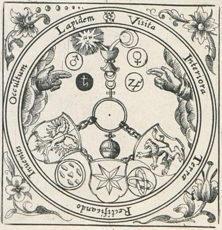 Emblem zum Vitriol aus Daniel Stolzens von Stolzenberg: Chymisches Lustgärtlein: Mit schönen in Kupffer geschnittenen Figuren gezieret/ auch mit Poetischen Gemälden illustrirt und erleutert ; Also daß es nicht allein Augen und Gemüt erquicket/ sondern zugleich [...]. Franckfurt 1624. XCV. Fig.